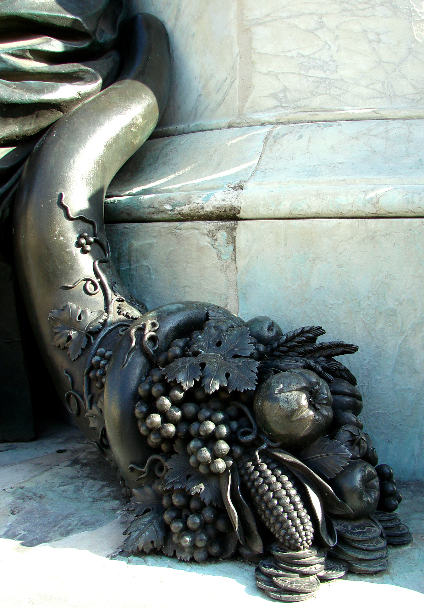 Corne d'Abondance; elle fait partie des allégories réalisées par Jean-Baptiste Pigalle pour le socle de la statue de Louis XV, Place Royale à Reims, en 1765.